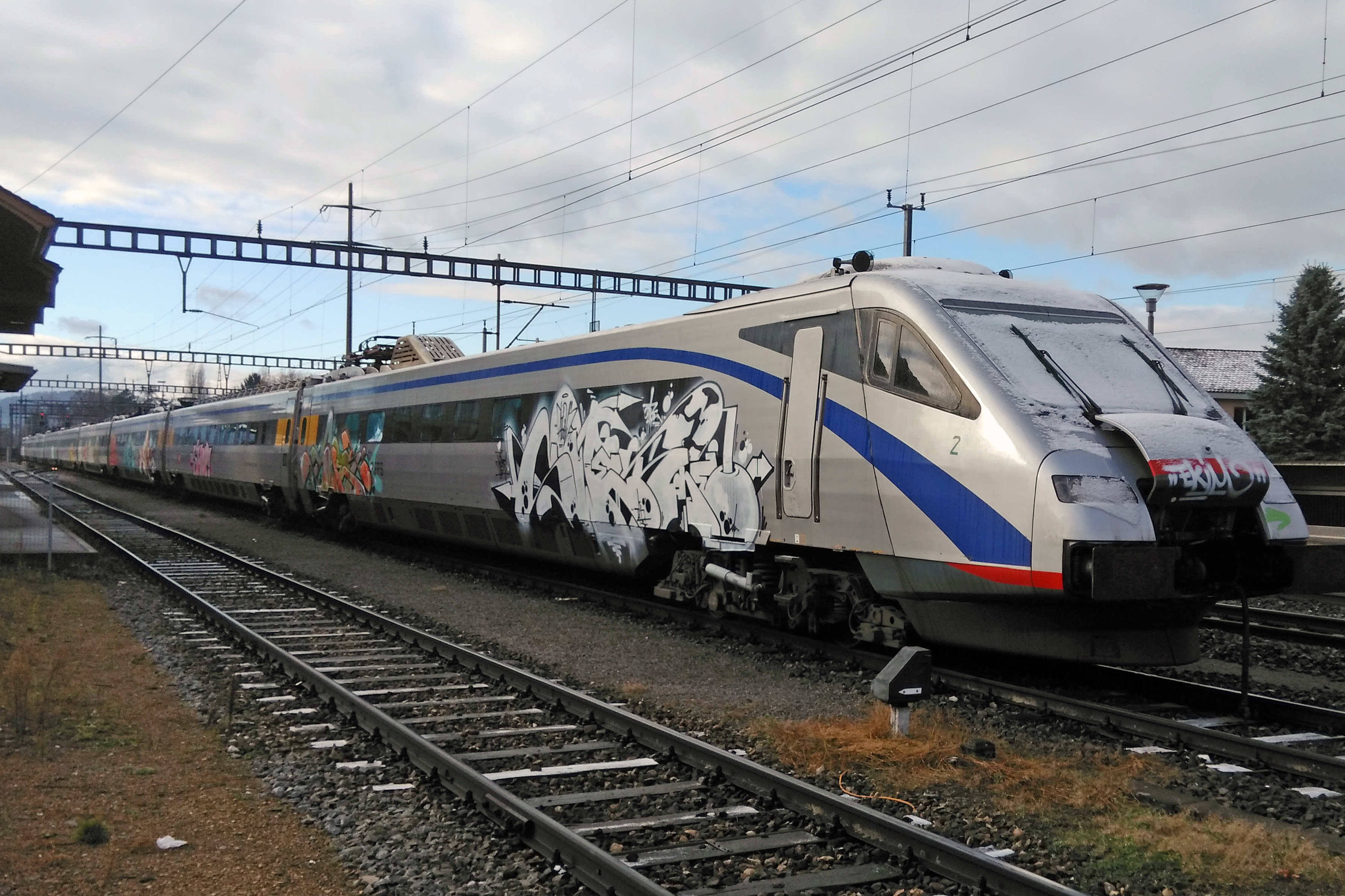 ETR-470 Triebzug der SBB, abgestellt im Bahnhof Kaiseraugst, um bei der Firma Thommen Recycling verschrottet zu werden. Fotographiert am 28. November 2015.